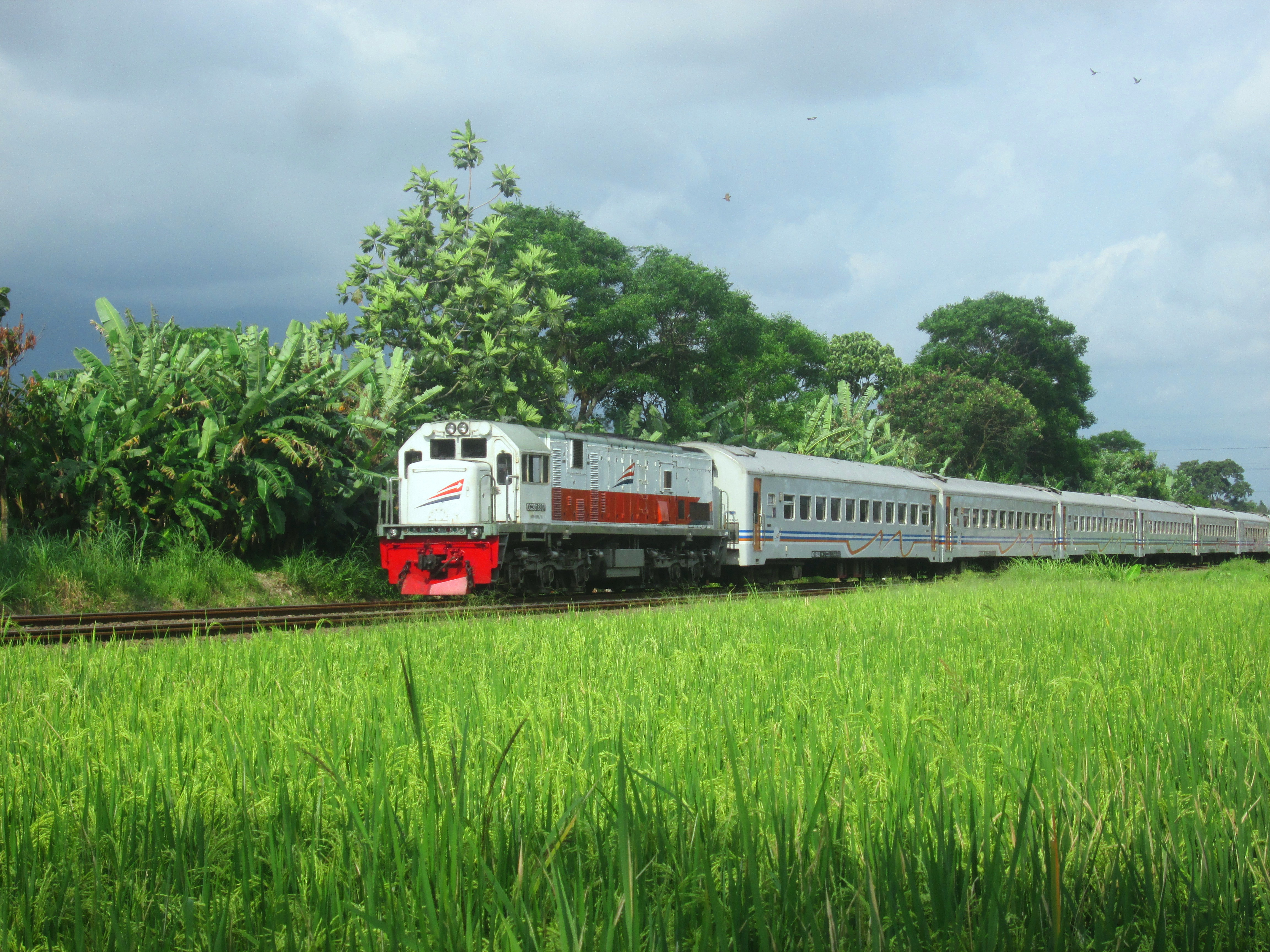 Kereta api Progo ditarik CC 201 83 07 atau CC 201 45, salah satu lokomotif misterius di Indonesia.